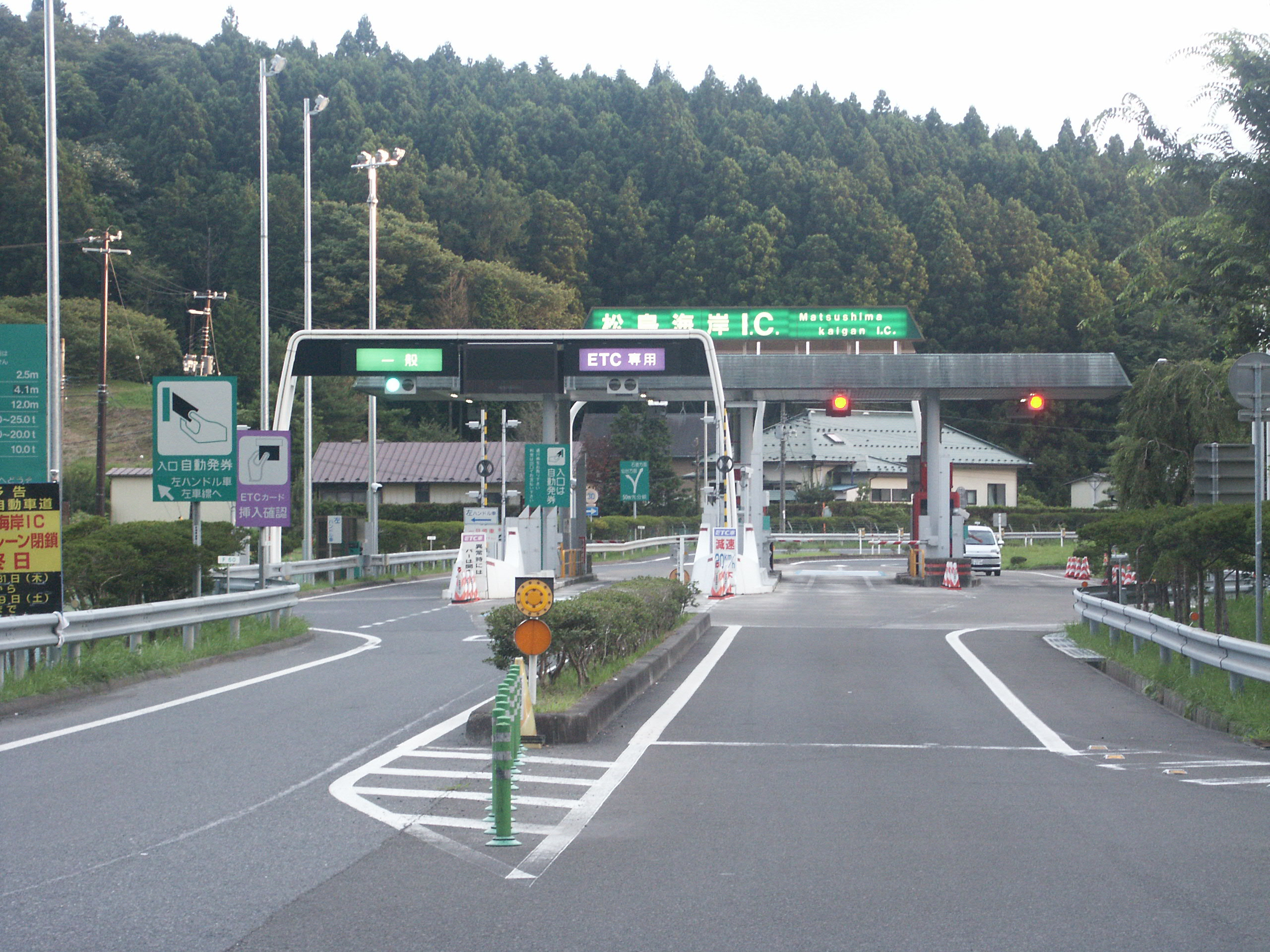 松島海岸インターチェンジ料金所付近